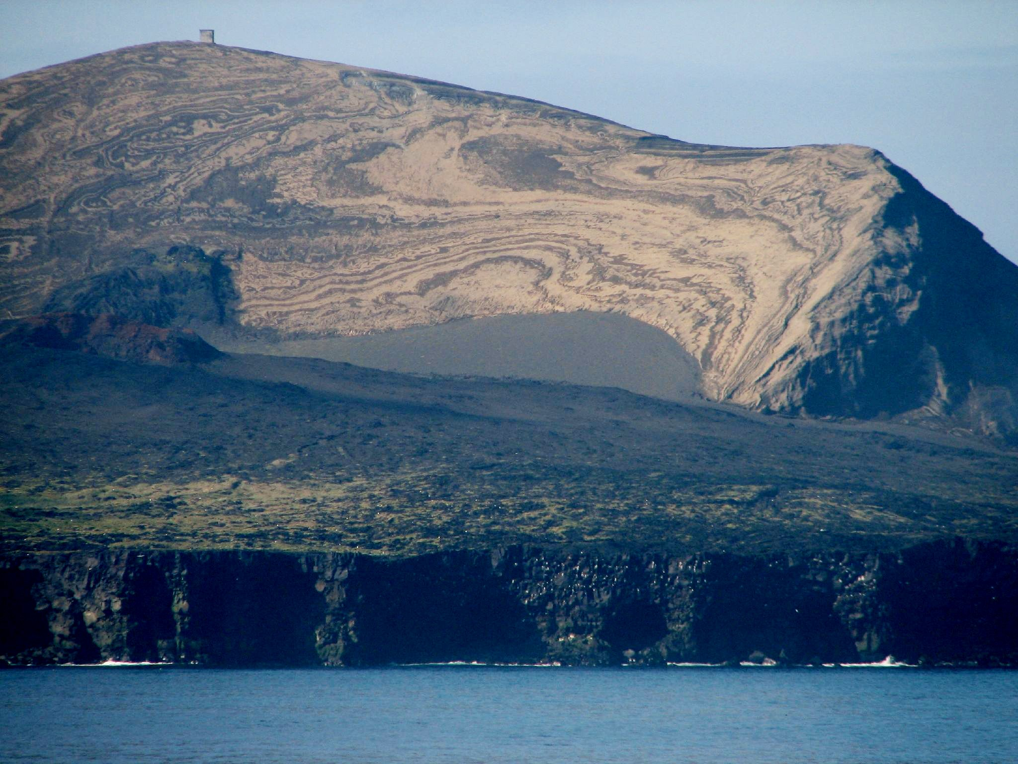 île de Surtsey